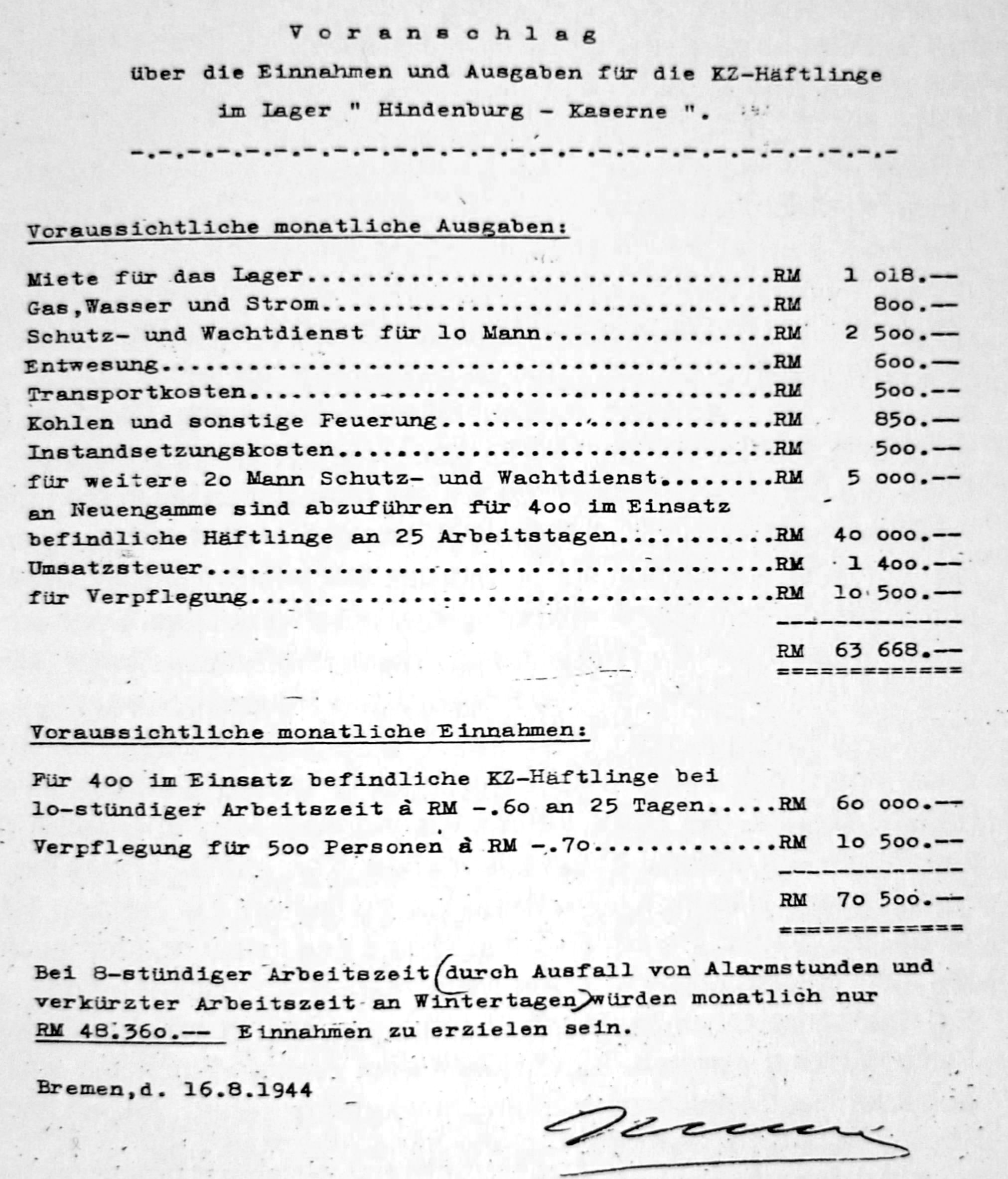 Aufstellung von Einnahmen und Unkosten eines Konzentrationslagers, erstellt durch die SS 1944 in Bremen